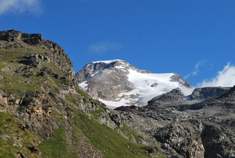 Piramide Vincent. Dalla val del Lys. Sulla sinistra punta Giordani. This is a photo of a monument which is part of cultural heritage of Italy.